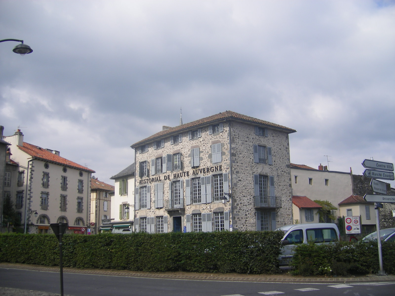 Aurillac